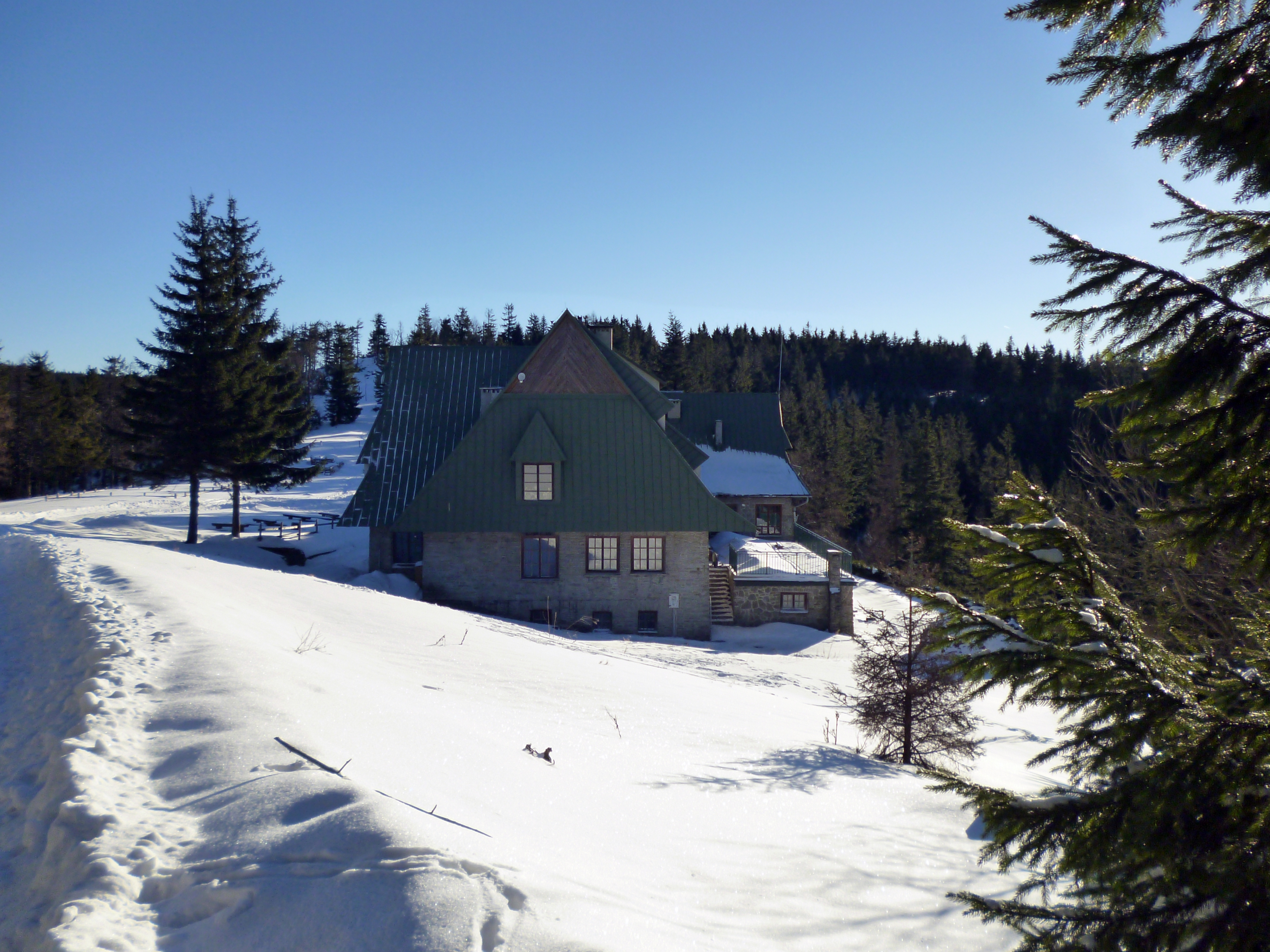 Przehyba, schronisko górskie w Beskidzie Sądeckim